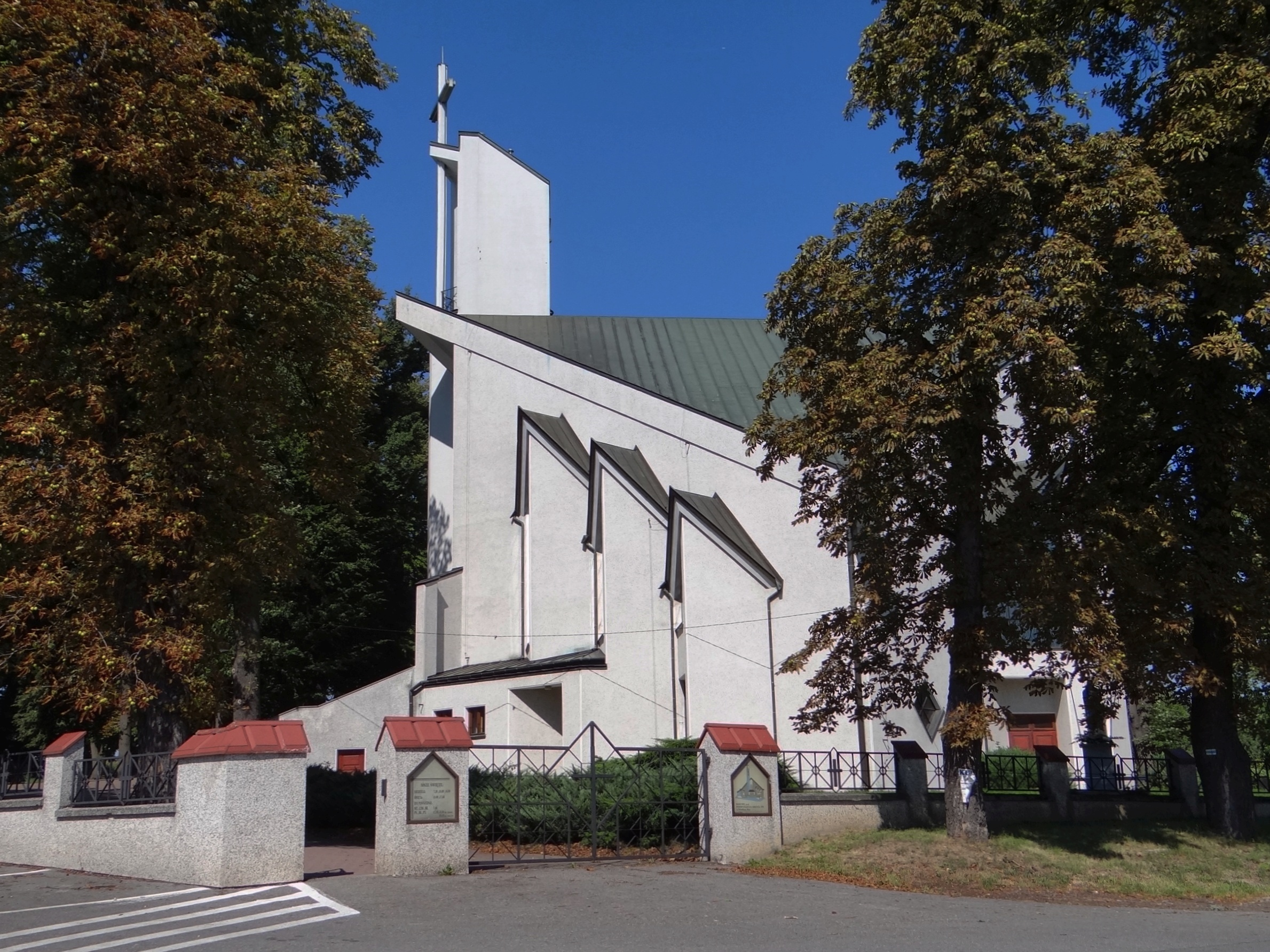 Wielka Wieś - rzymskokatolicki kościół parafialny pw. Podwyższenia Krzyża Świętego, 1985-1993